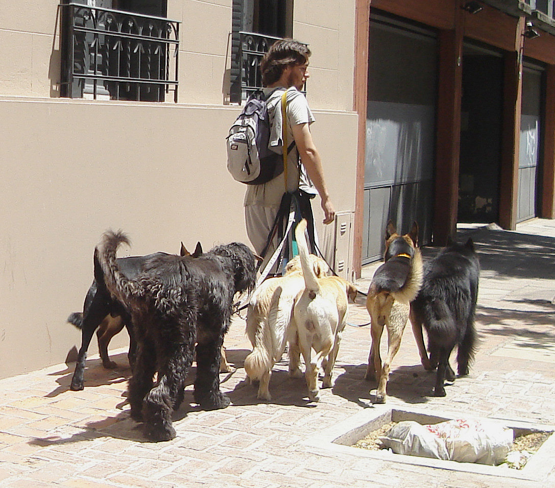 Dog Walking